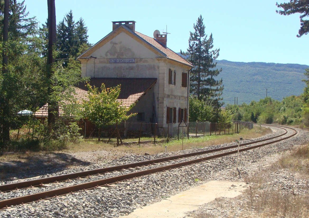 L'ancienne gare de Pont-de-Chabestan, sur la ligne Marseille - Briançon, entre Serres et V eynes (Hautes-Alpes).